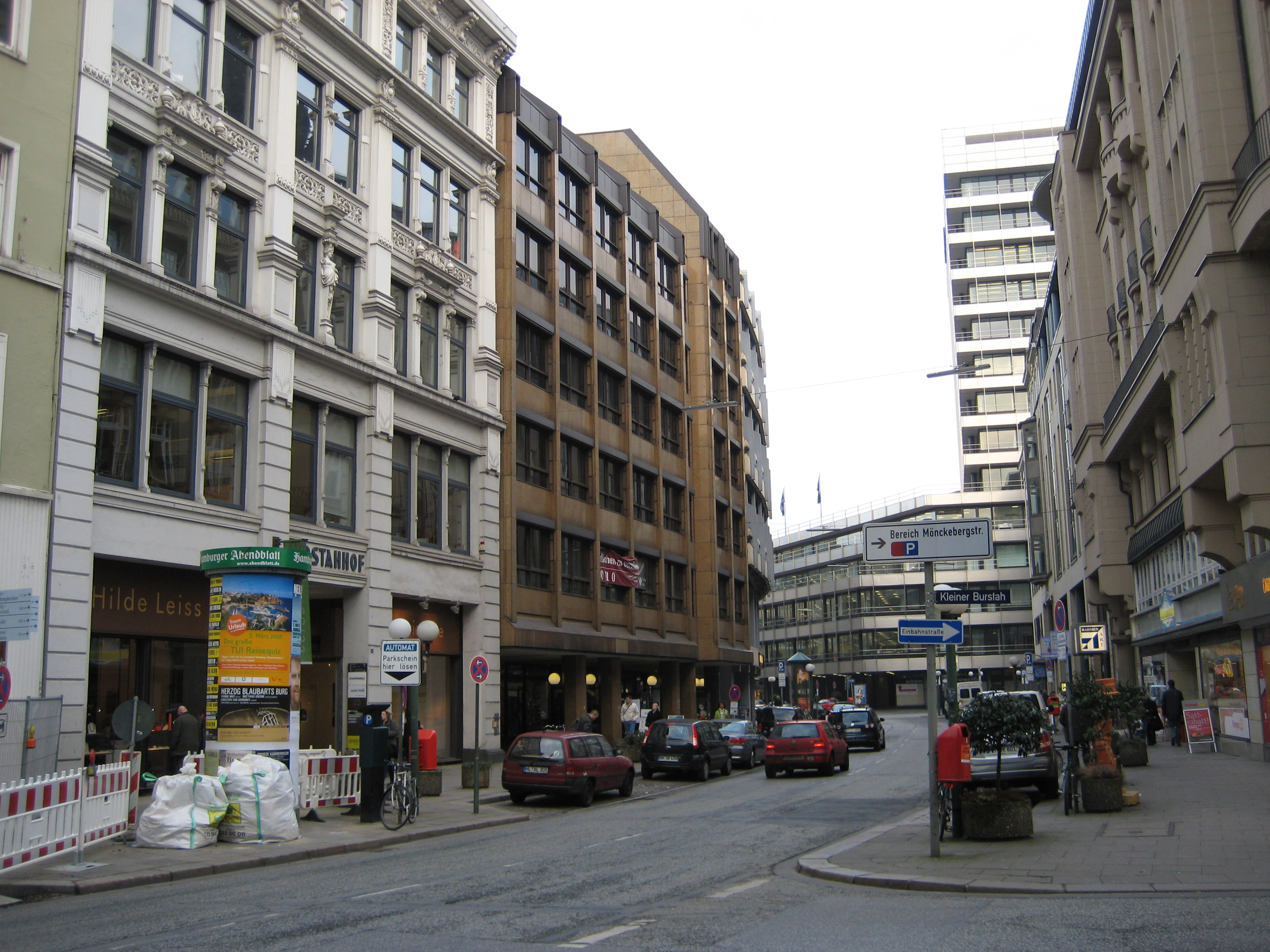 Großer Burstah, Hamburg. Der links im Bild befindliche Burstahhof wurde 1887/88 nach Plänen von Bahre & Querfeld erbaut und steht seit 2009 unter Denkmalschutz. This is a photograph of an architectural monument.